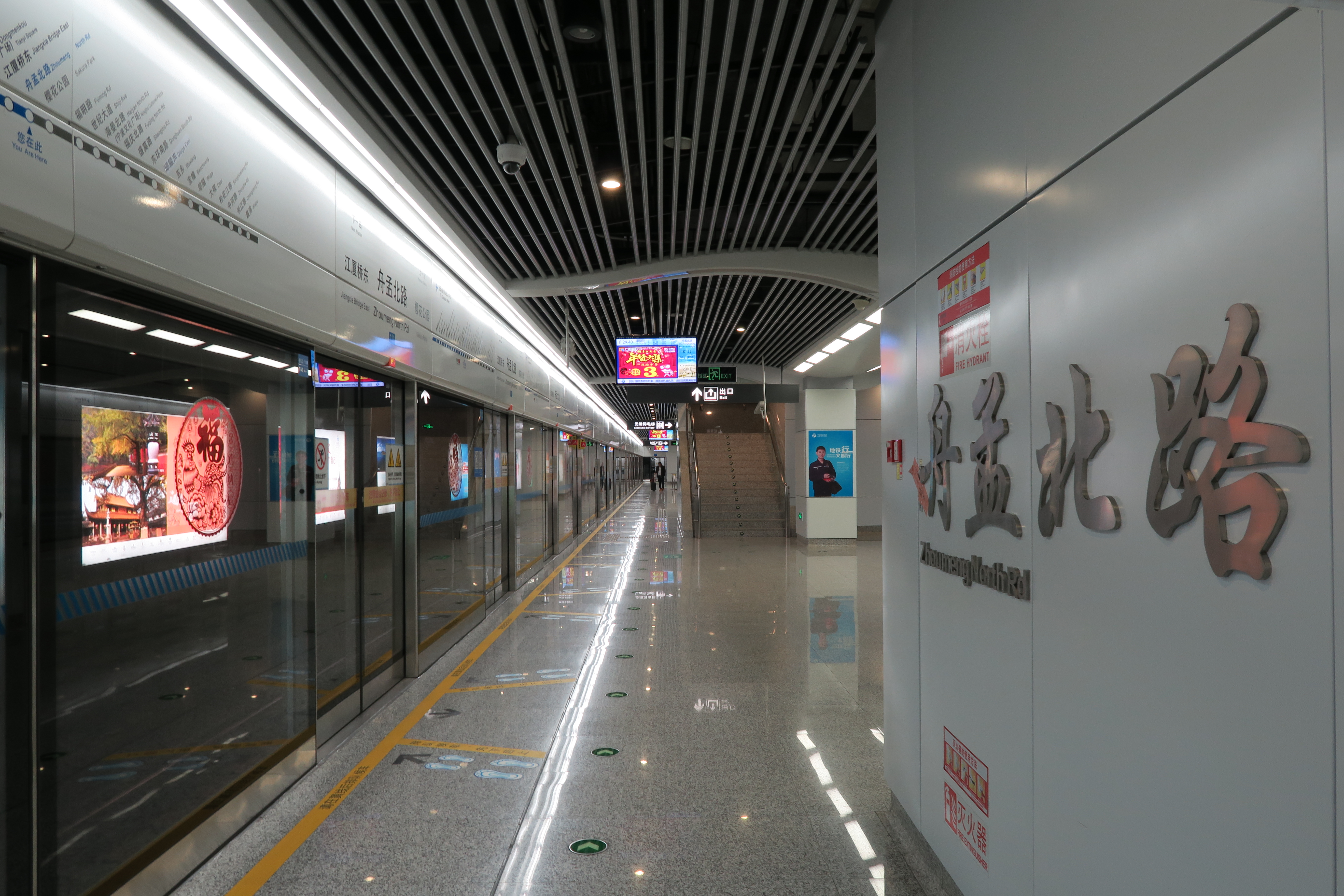 舟孟北路站